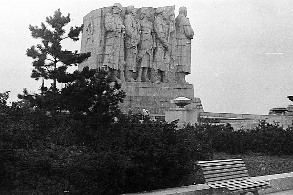 pomnik Stalina w Pradze, Czechosłowacja